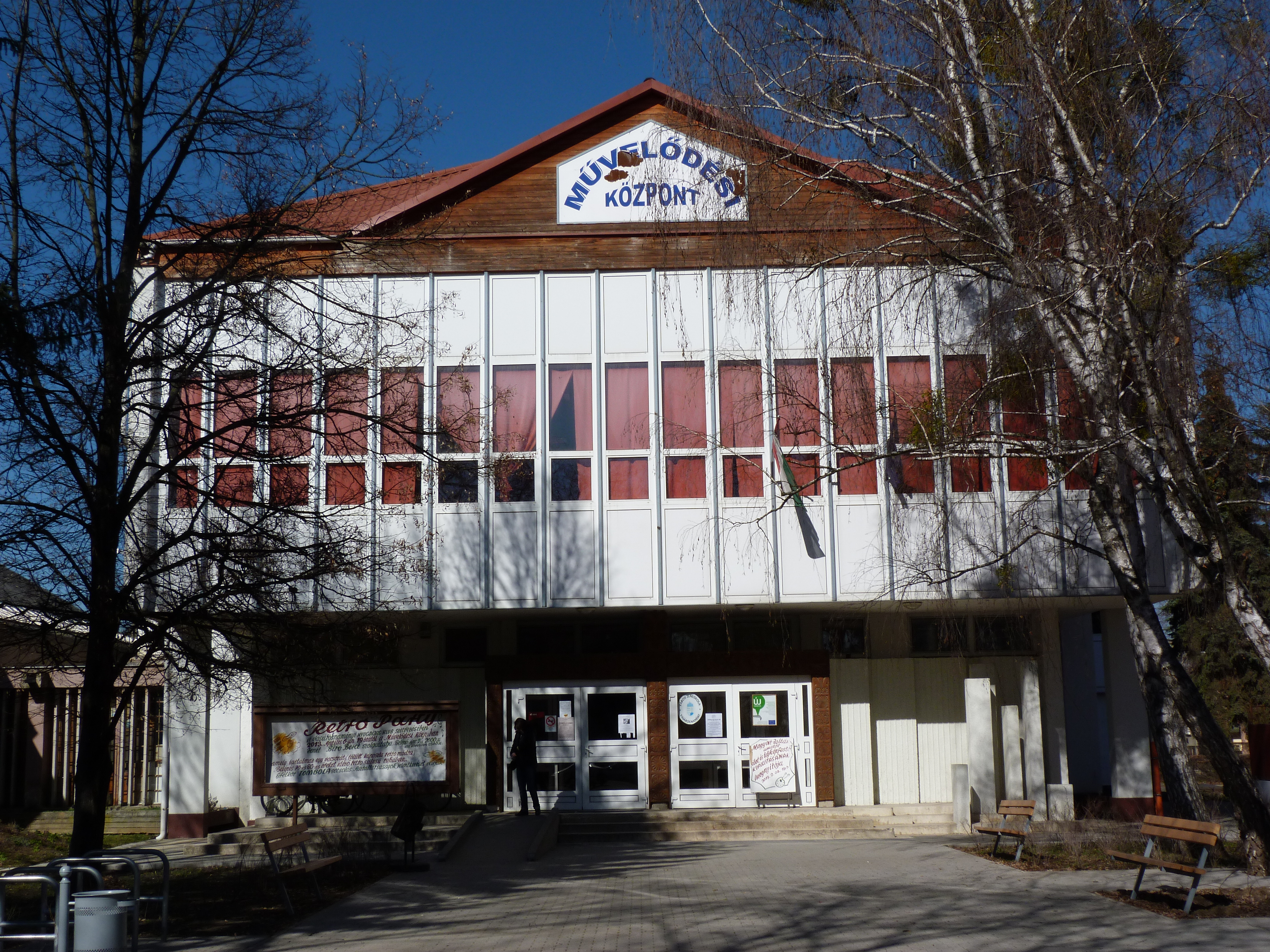 A felvételek 2013. Február 5 –én készültek Vásárosnaményben. Művelődési Ház.